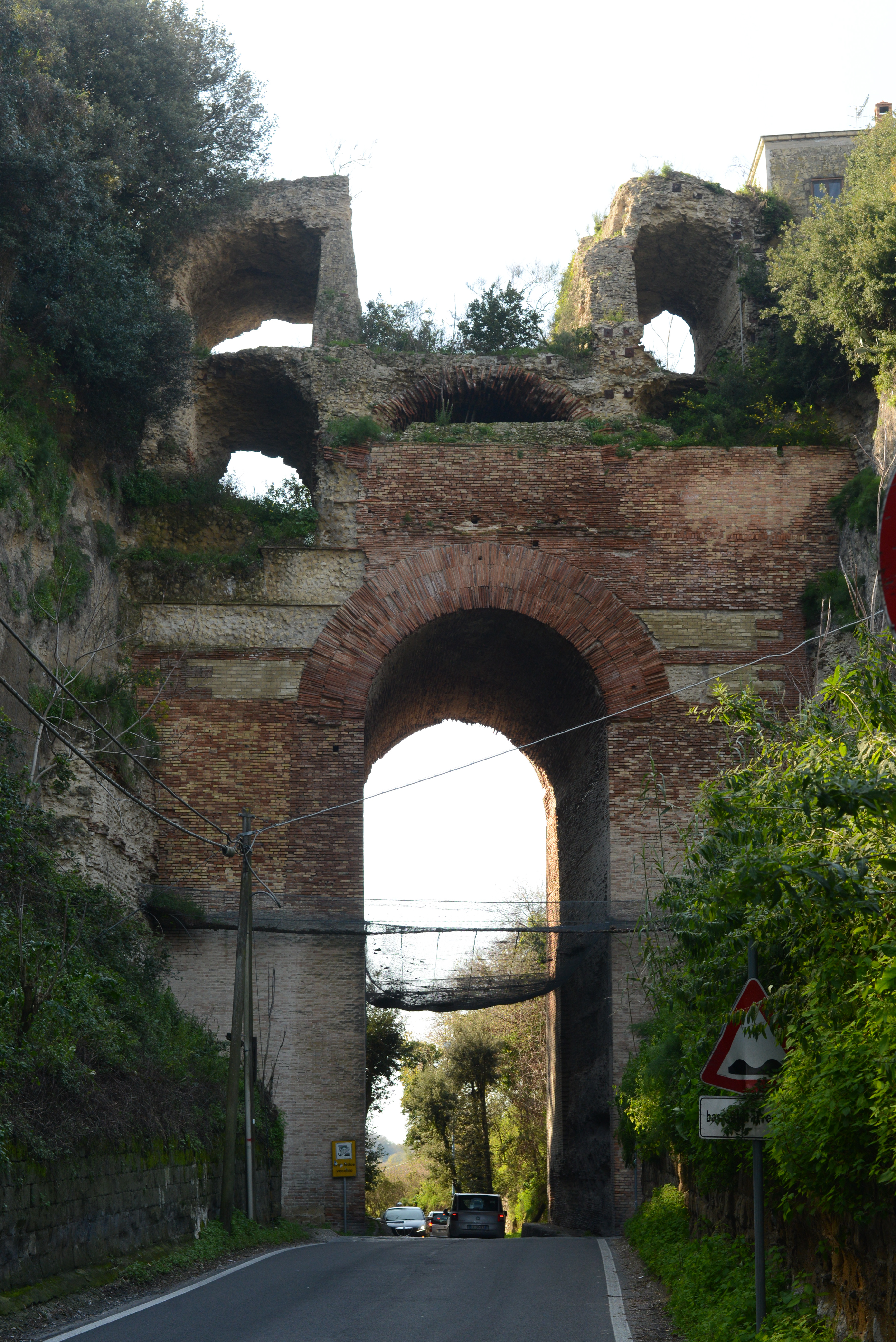 L'Arco Felice romano, Pozzuoli